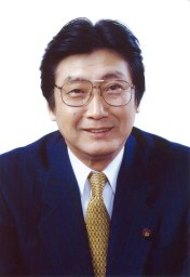 金子一義（2003年時）